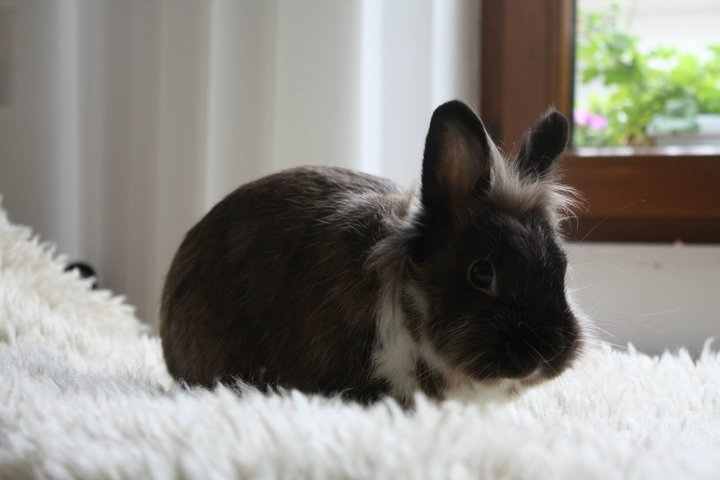 Заек, порода Лъвска глава.